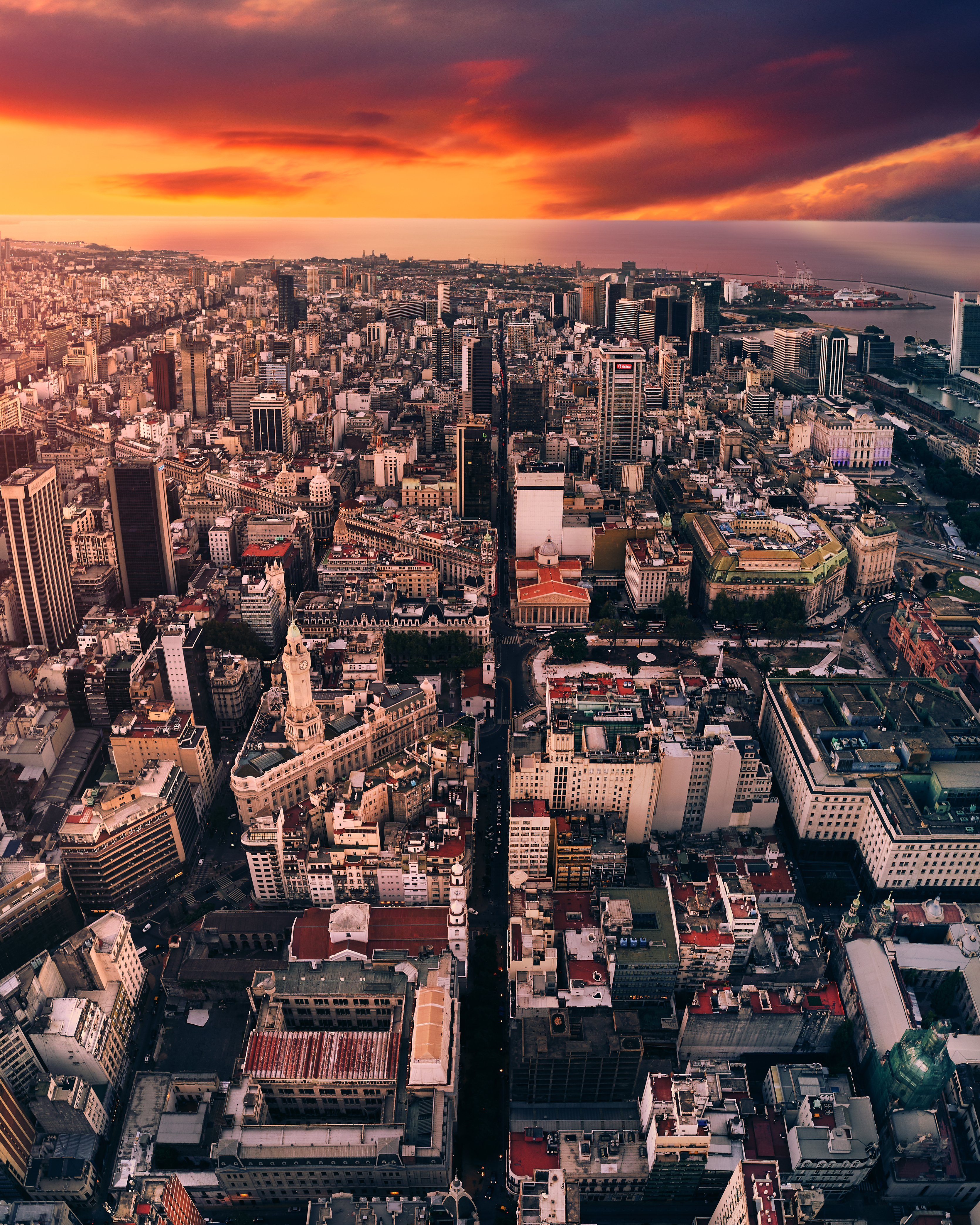 Buenos Aires Center